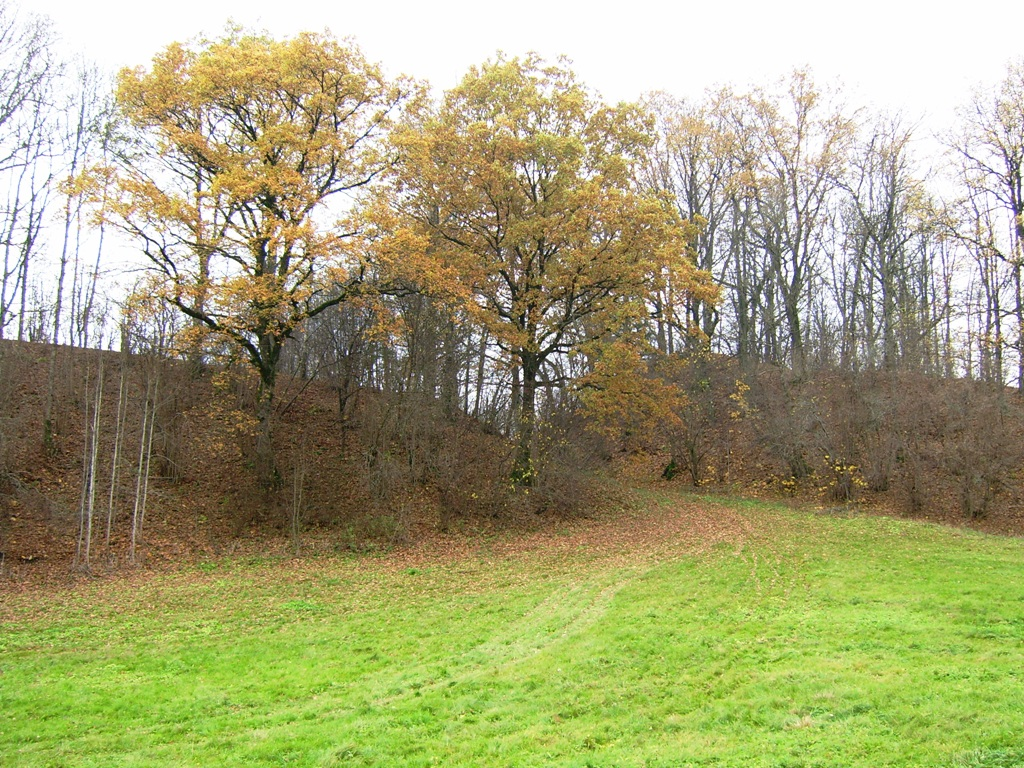 Pakisio piliakalnis